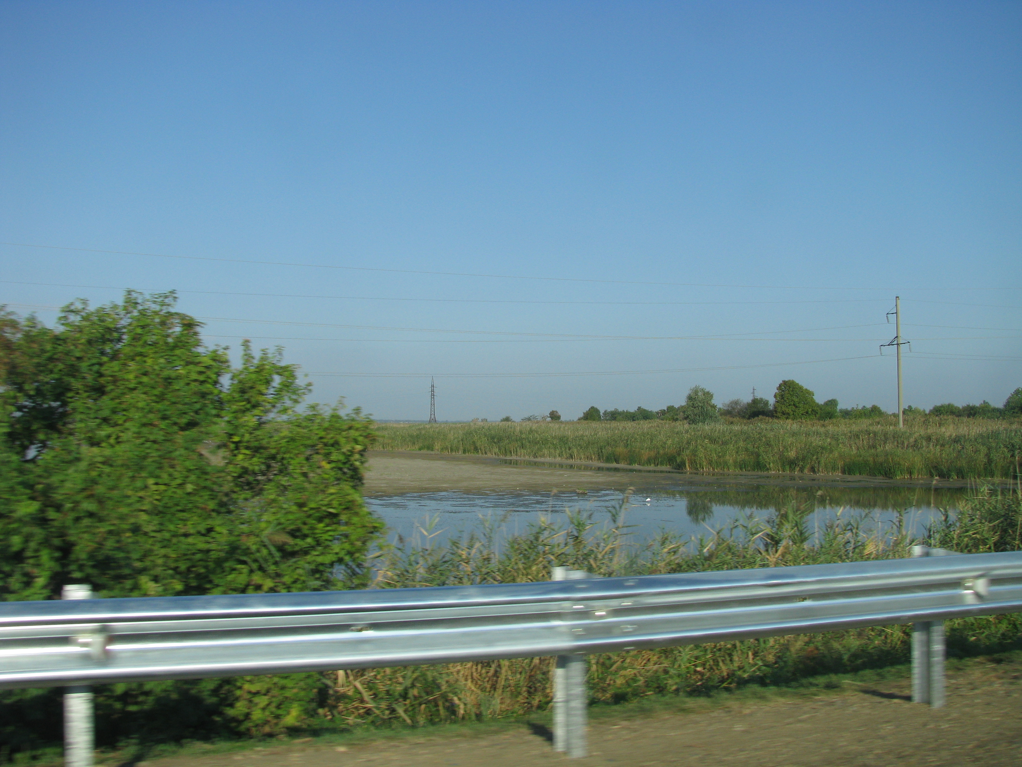 Бейсуг (река) (вид с дороги)